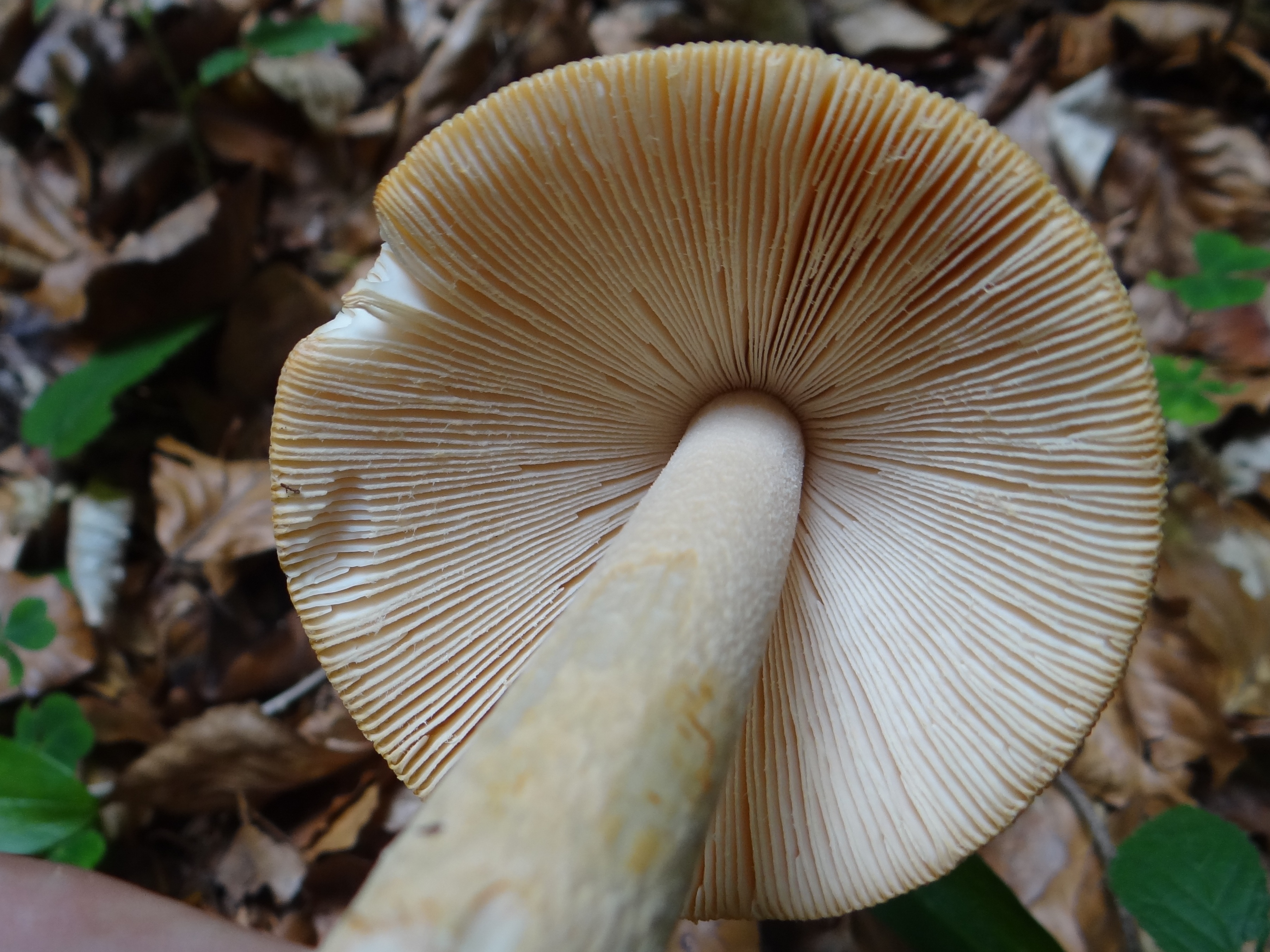 Amanita vaginata (location: Poland)